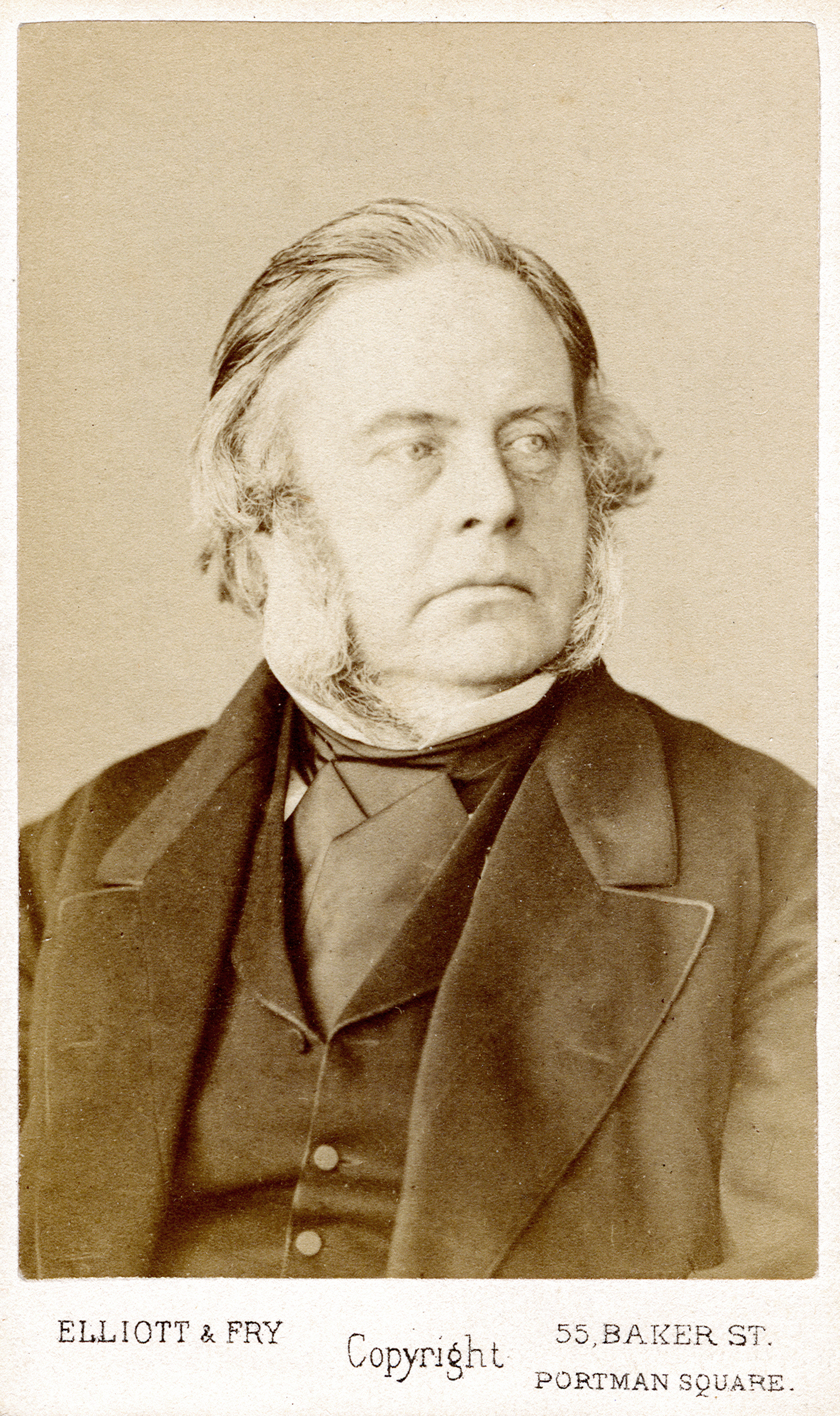 Carte de visite von John Bright, Foto von Elliott & Fry